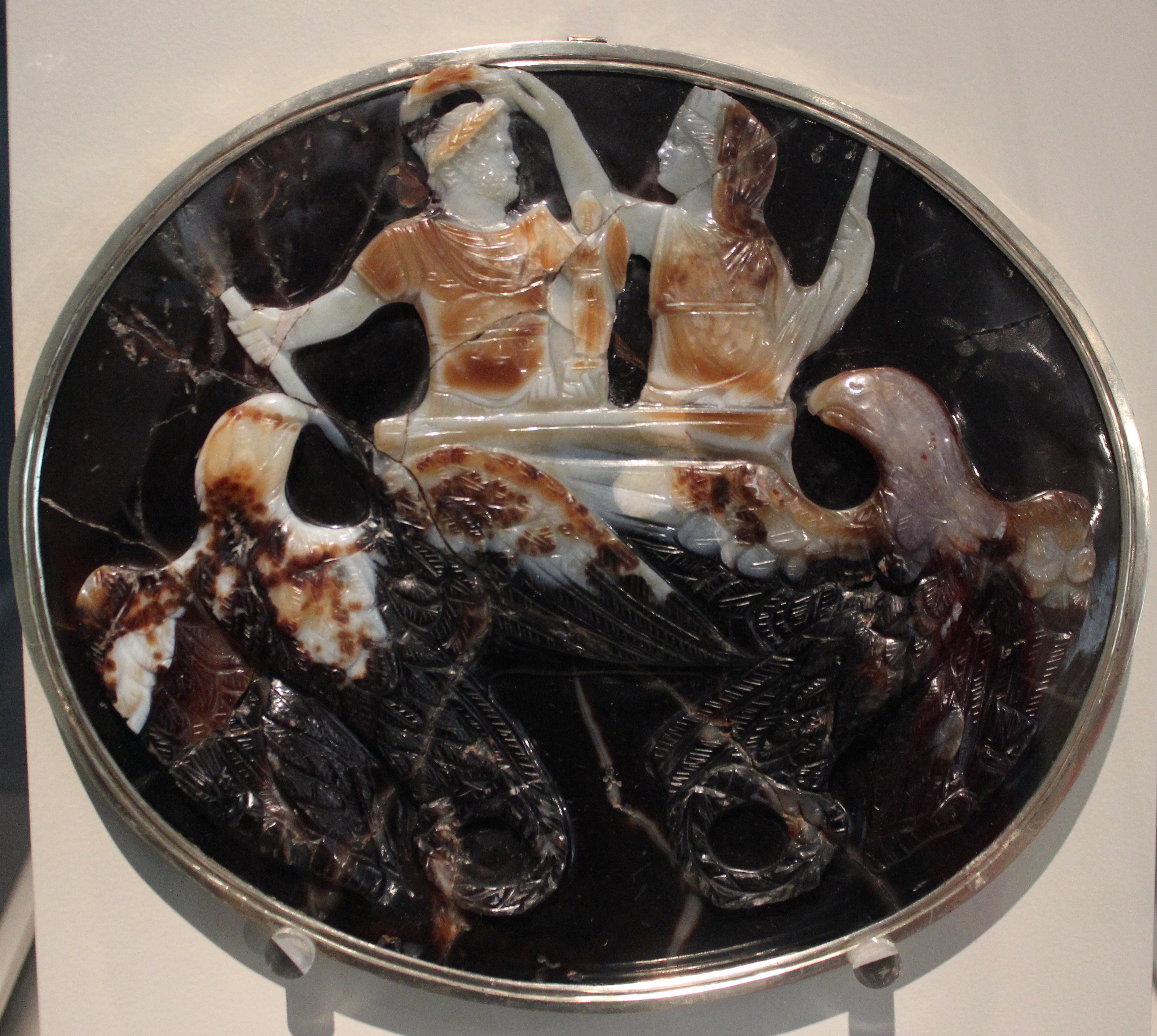 Berlín, Altes Museum. Camafeo de Adriano.